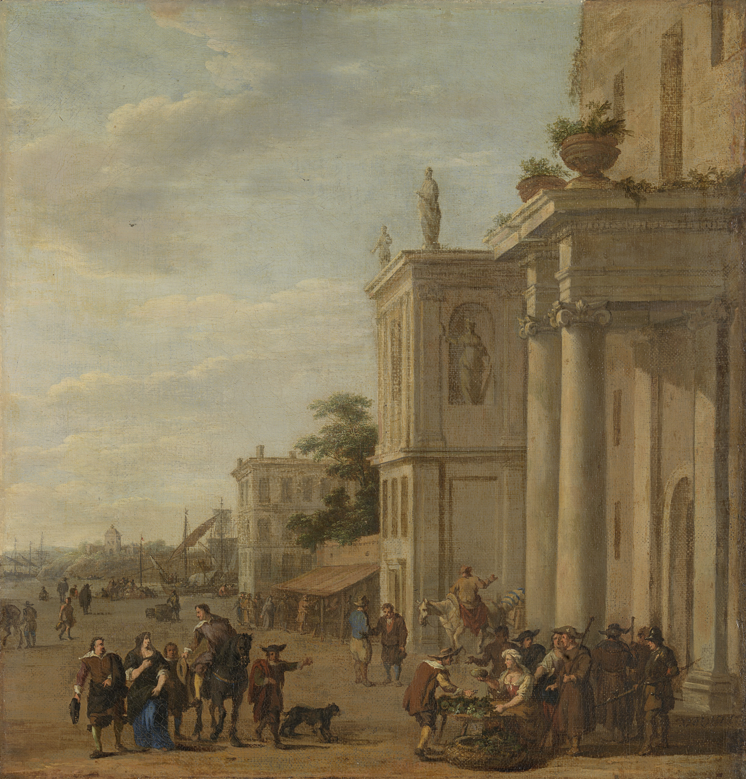 Italiaans marktplein in een stad. Voor de zuilen van een kerk staat een vrouw achter een kraampje, verderop staan meer marktkramen. Op straat een groep bedevaartsgangers, enkele ruiters en passanten.